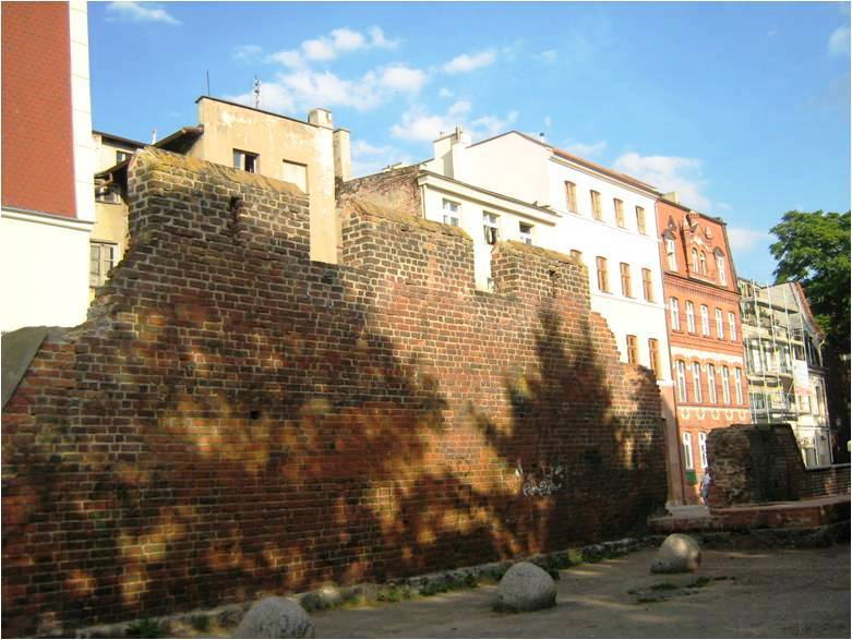 Toruń, ul. Pod Krzywą Wieżą - mury miejskie Starego Miasta (zabytek nr A/1256)